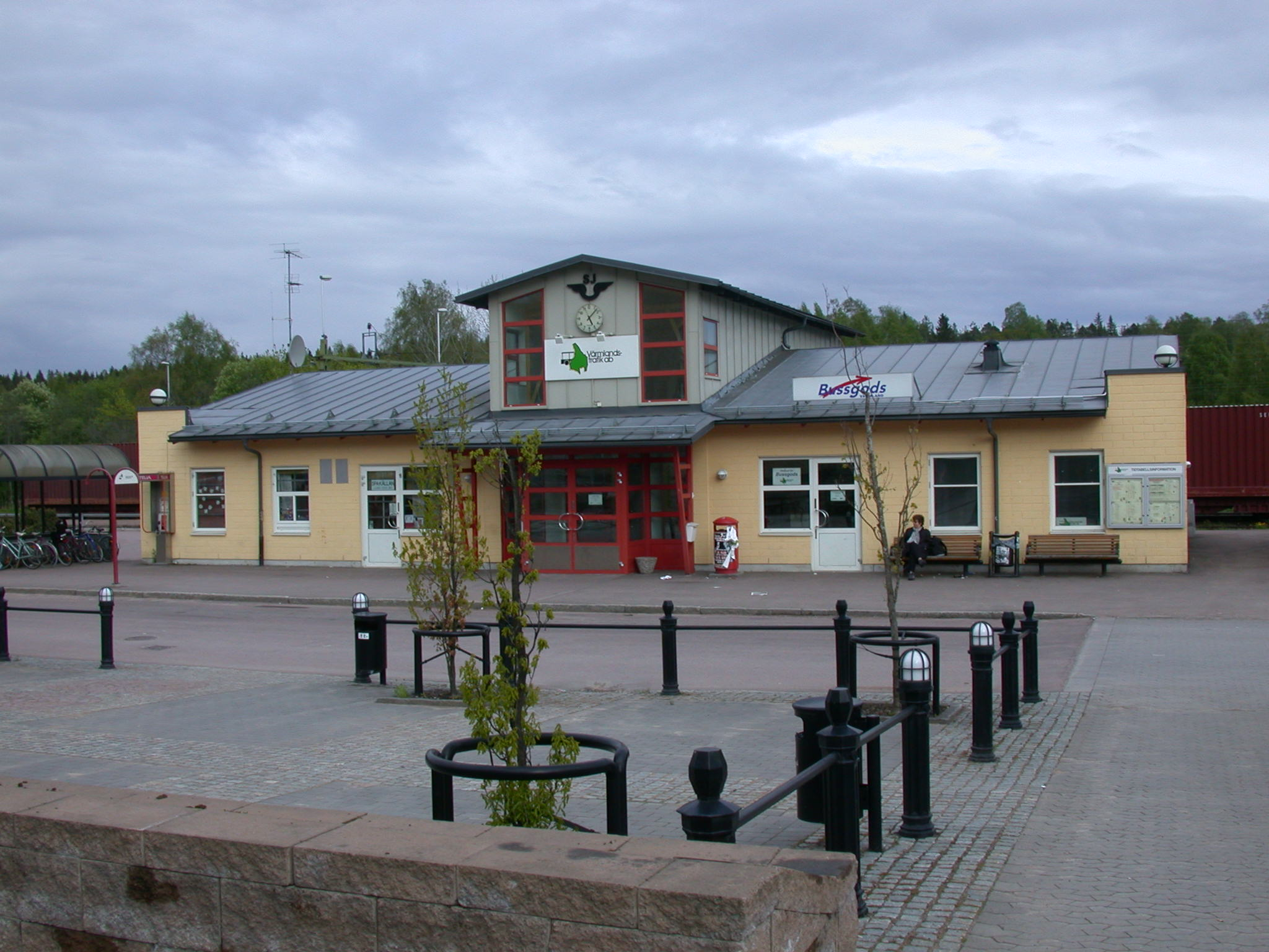 Grums railway station, Grums, Sweden. Photo by Riggwelter, May 20, 2006. Seit 1. Mai 2010 befindet sich im ehemaligen Bahnhofsgebäude nun die neue Vårdcentrale (Ärztehaus).